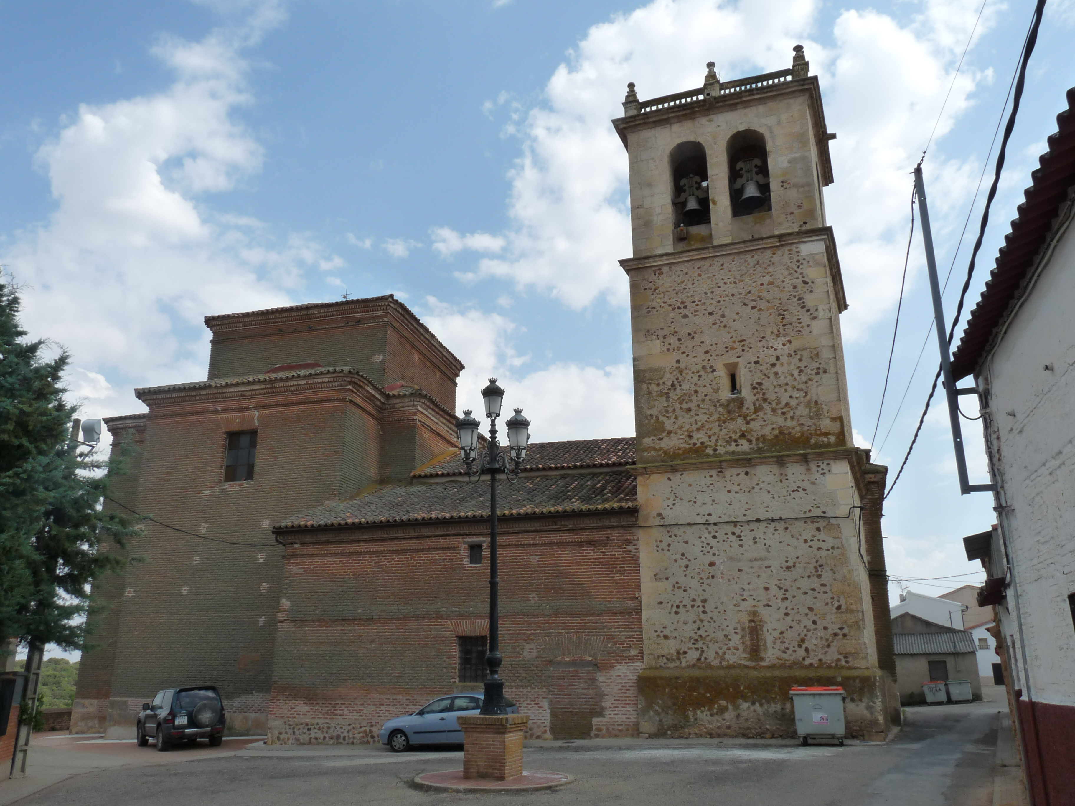 Vista de Fuentelahiguera de Albatages, (Guadalajara, Castilla-La Mancha, España).